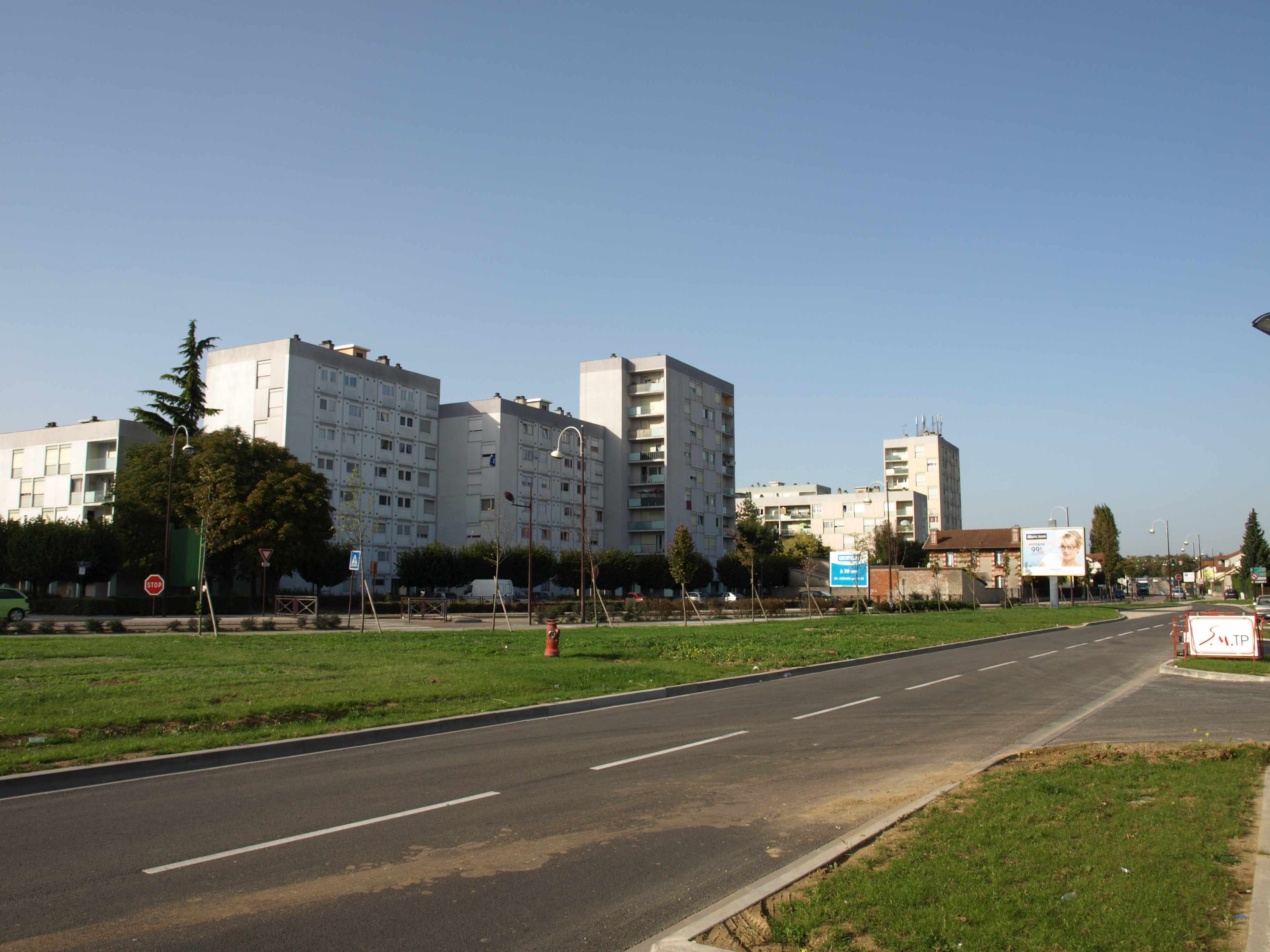 Vitry-le-François (51300 - FRANCE) : photographies Quartier Bords de Marne (bâtiments et N44)